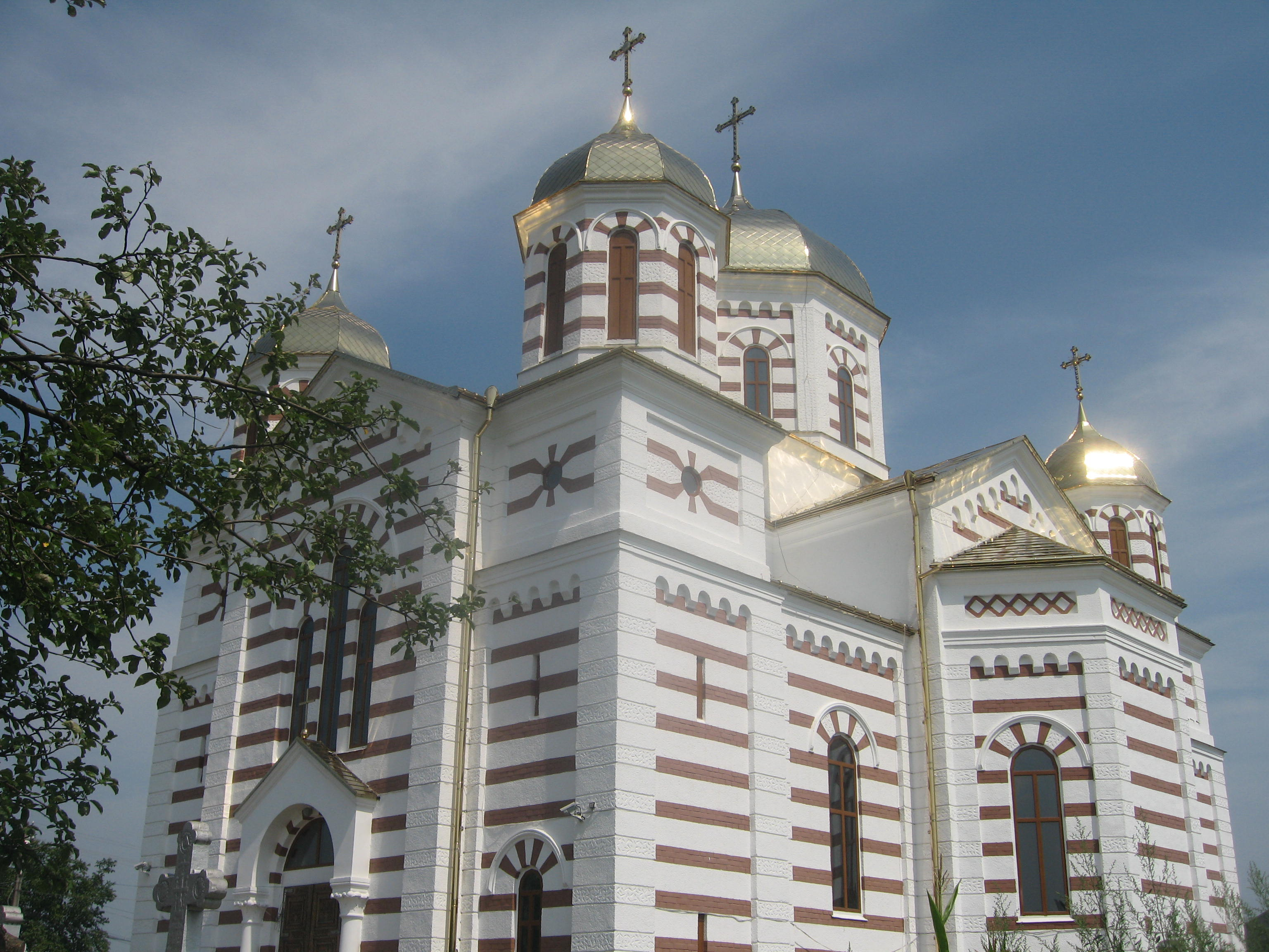 Biserica Sf. Arhangheli din Cajvana, Suceava County